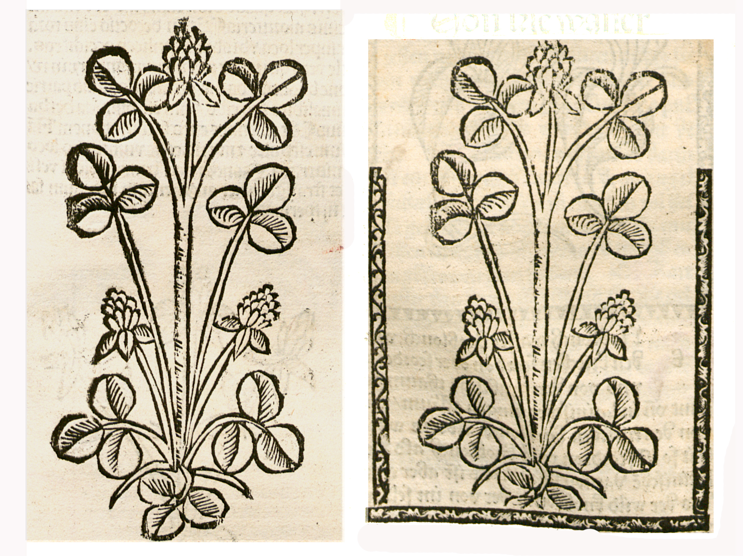 Abbildung von: Kle (Trifolium pratense)